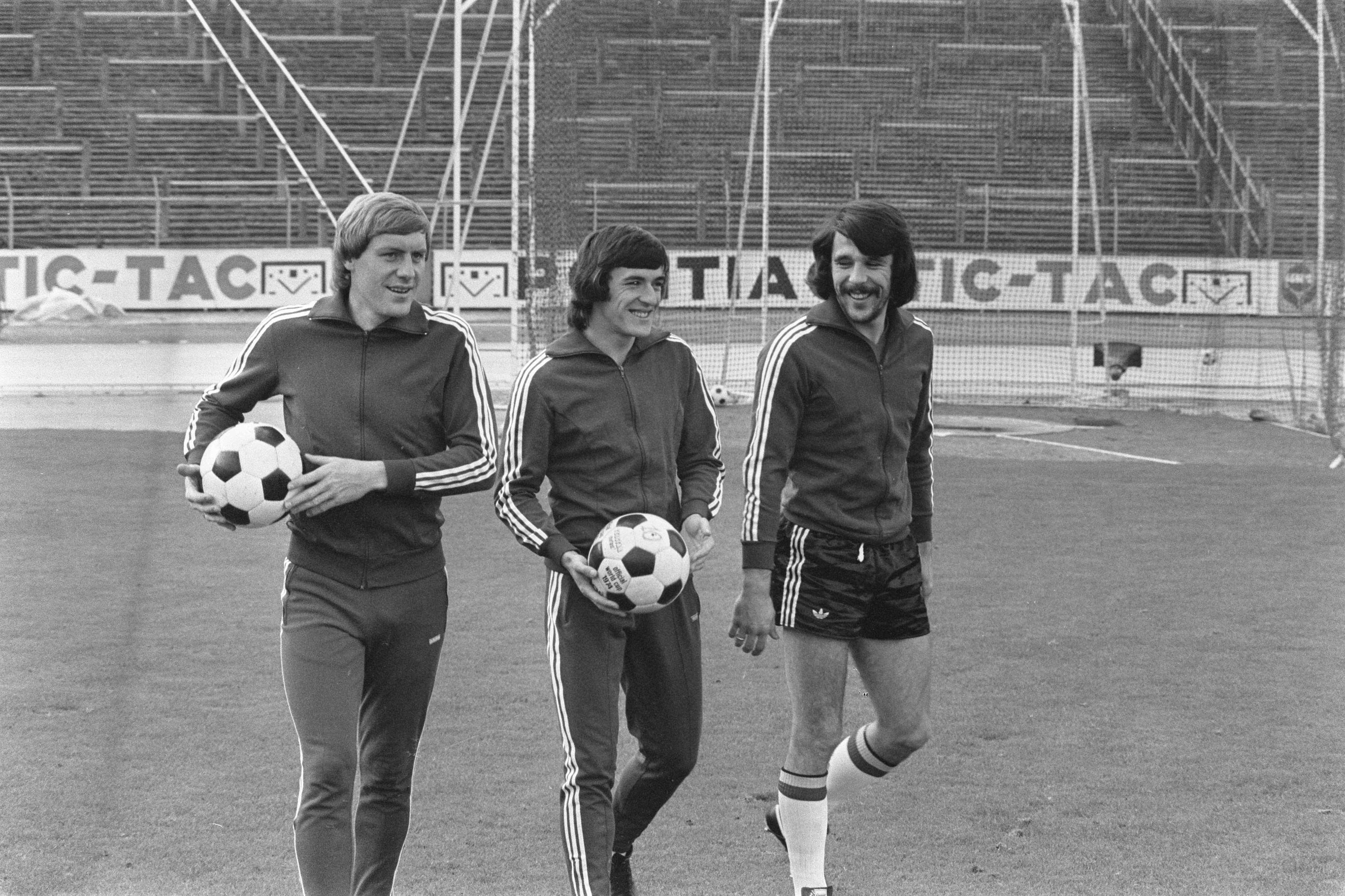 Collectie / Archief : Fotocollectie Anefo Reportage / Serie : [ onbekend ] Beschrijving : Training Belgisch elftal in Brussel; Hugo Broos (l) en Van de Elst tijdens training Datum : 25 oktober 1977 Locatie : Brussel Trefwoorden : elftallen, sport, voetbal Fotograaf : Verhoeff, Bert / Anefo Auteursrechthebbende : Nationaal Archief Materiaalsoort : Negatief (zwart/wit) Nummer archiefinventaris : bekijk toegang 2.24.01.05 Bestanddeelnummer : 929-4066